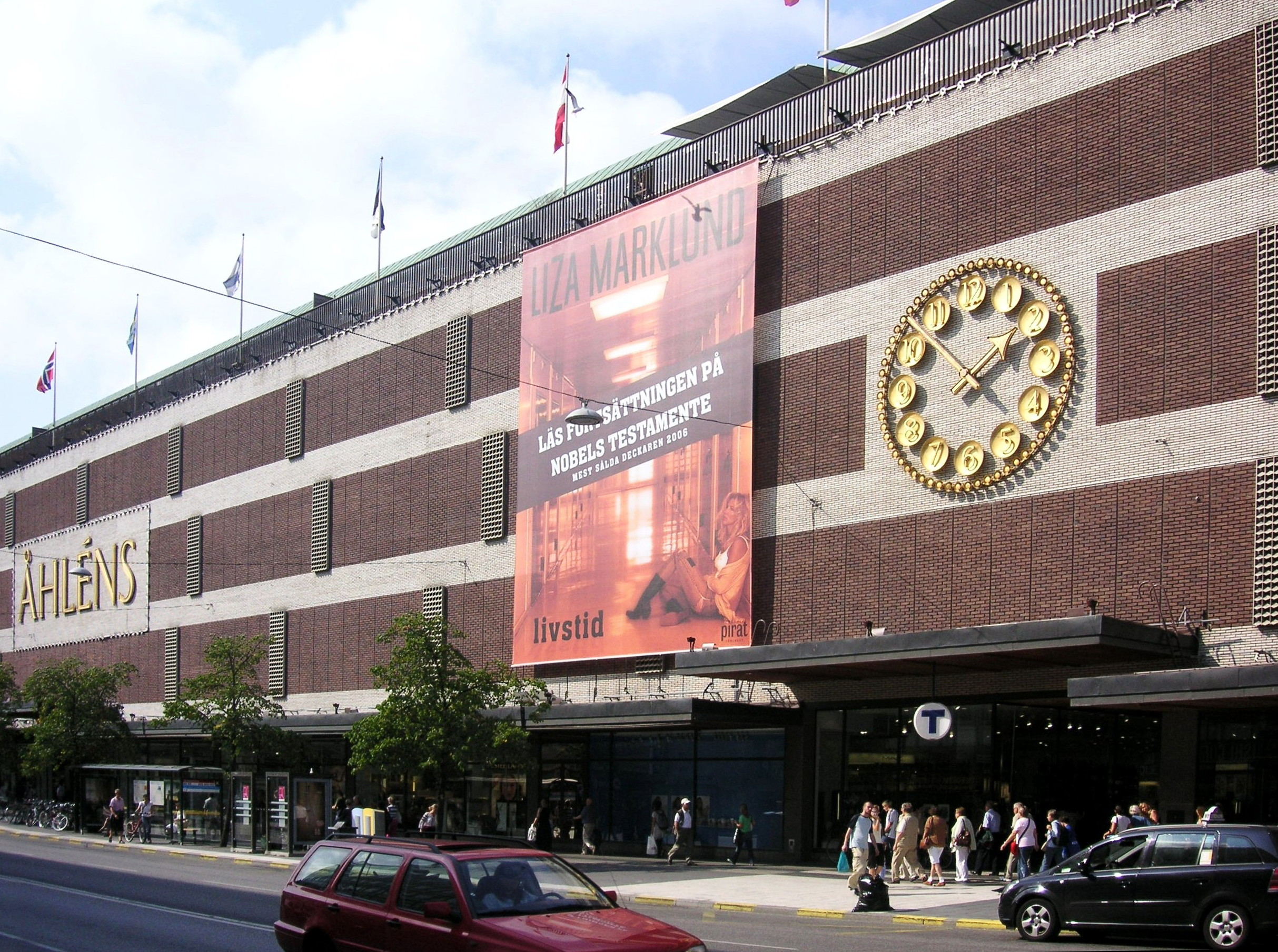 Åhléns i Stockholms city